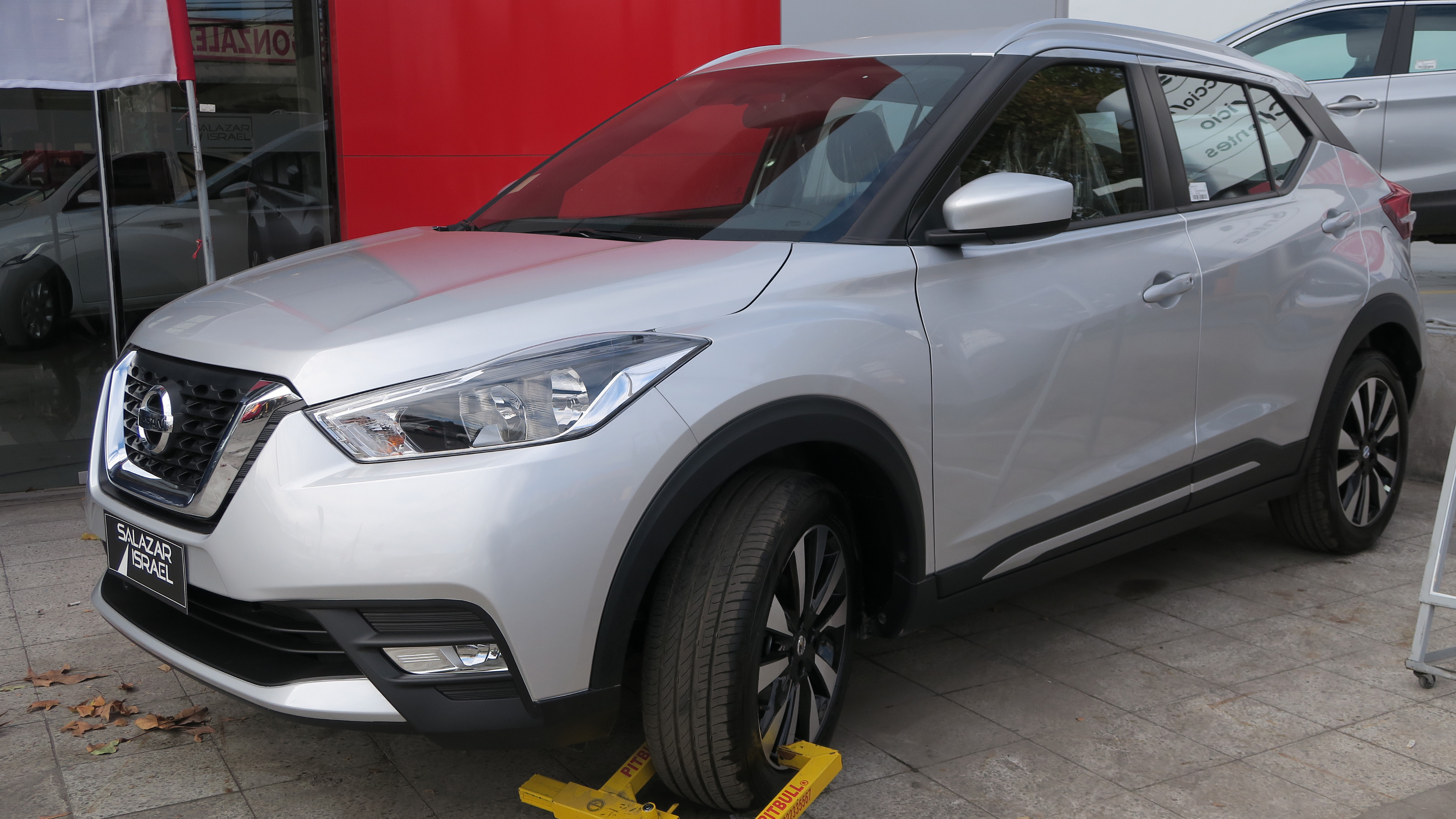 Nissan Kicks